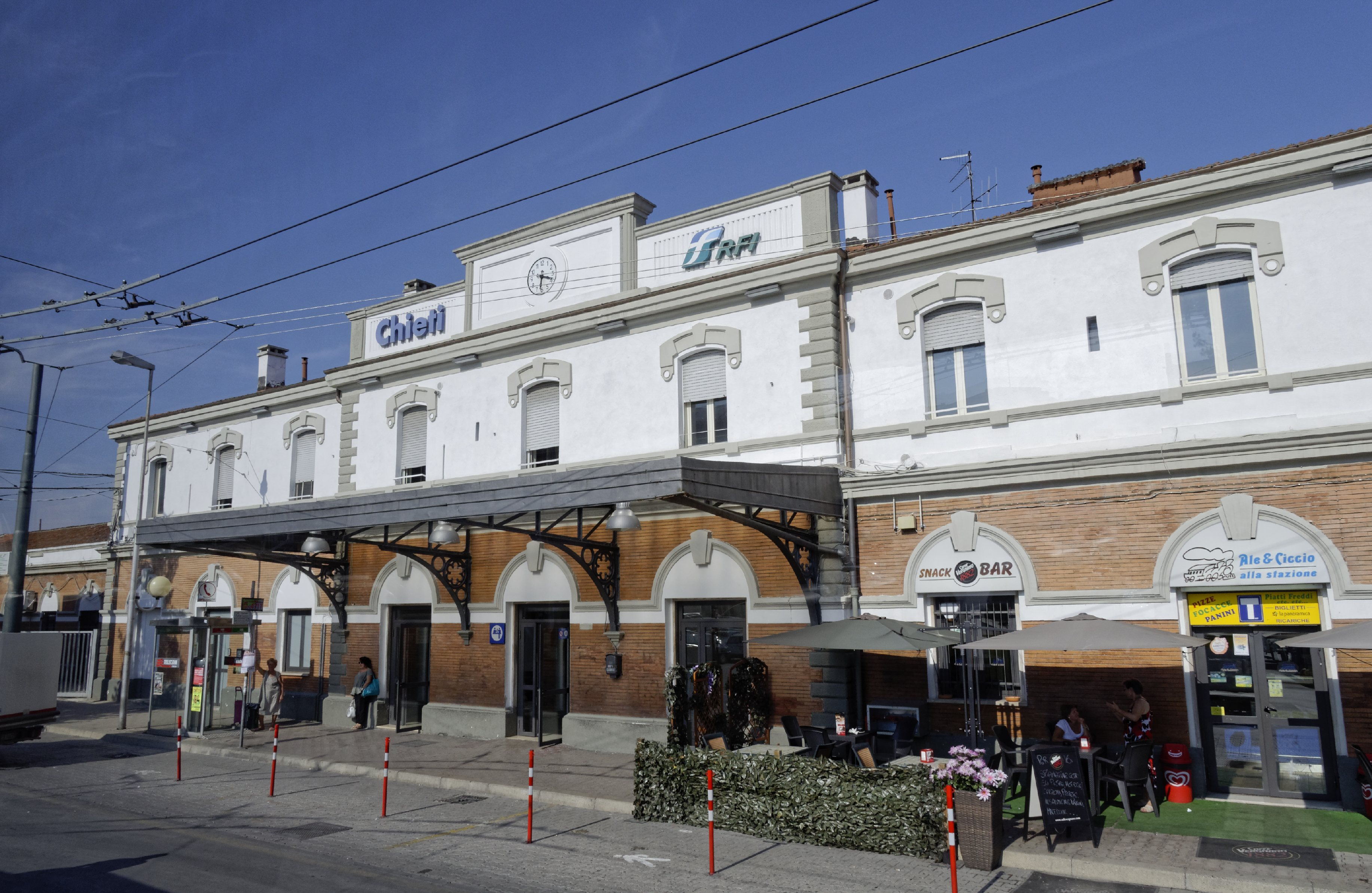 Chieti 2015